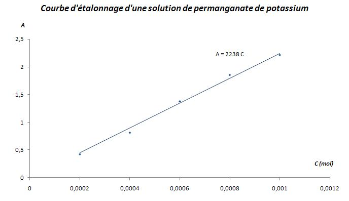 Courbe d'étalonnage d'une solution de permanganate de potassium